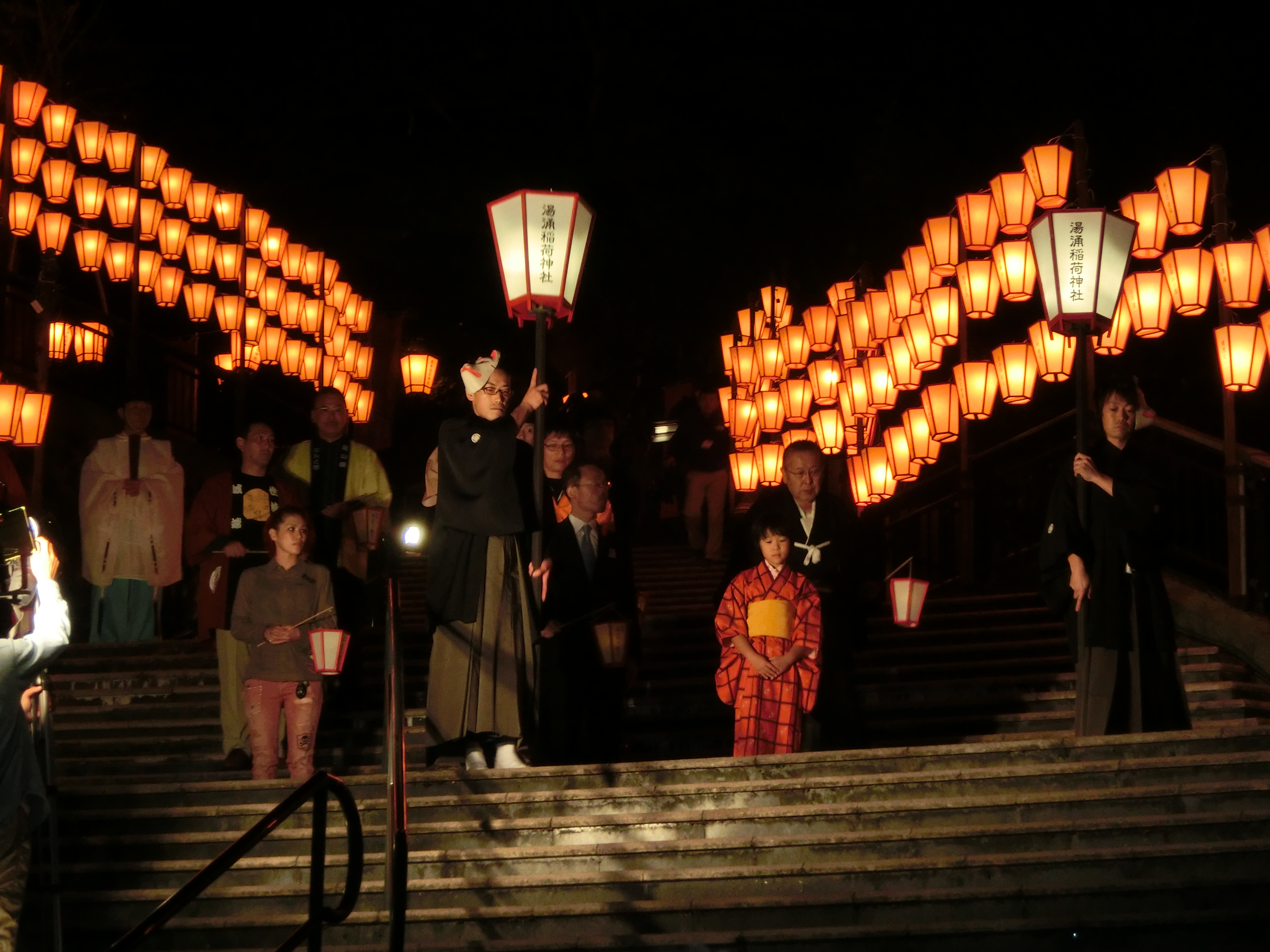 第2回湯涌ぼんぼり祭の神送の儀の様子。